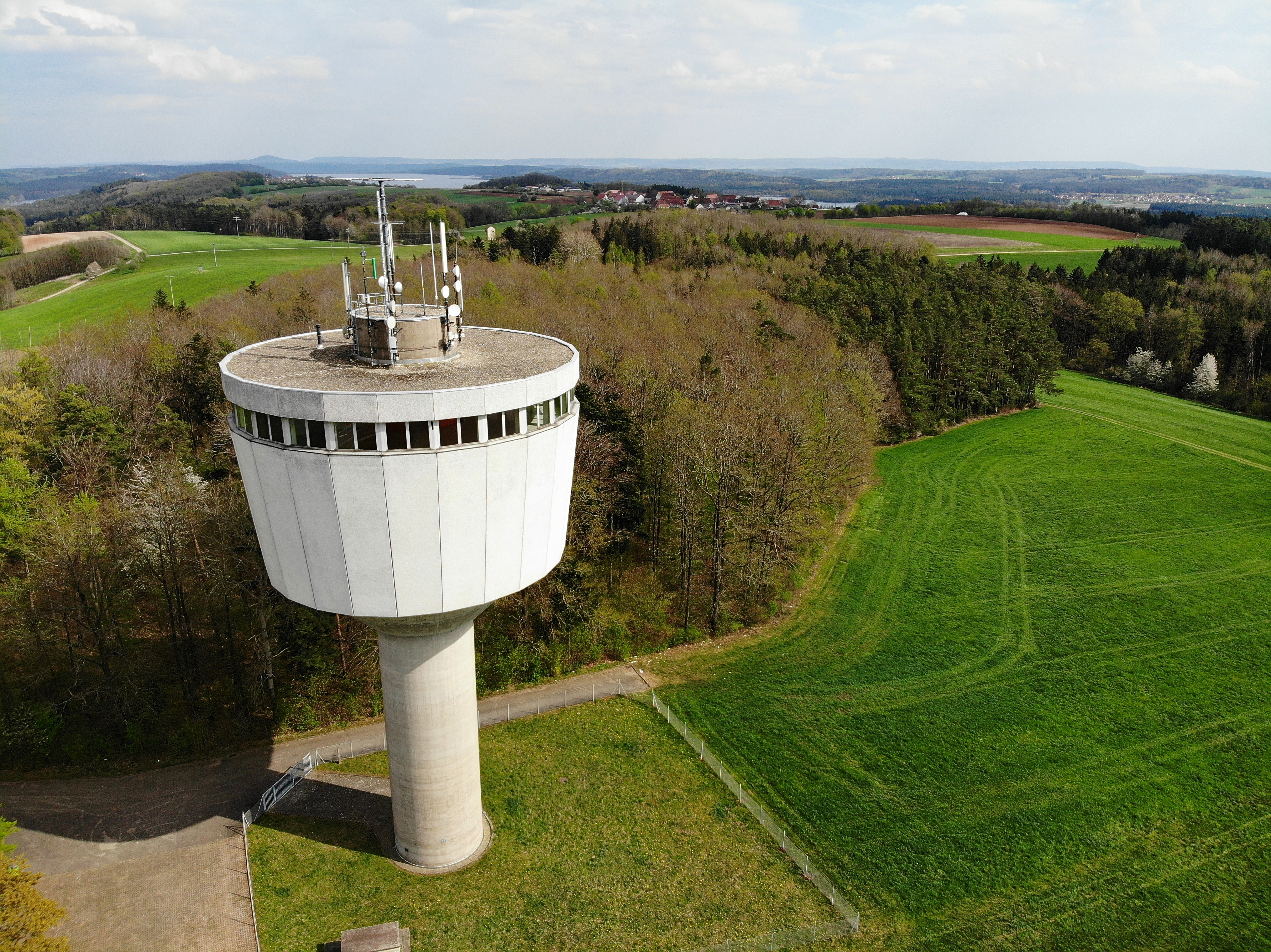 Wasserturm Gräfensteinberg Luftaufnahme (2020)